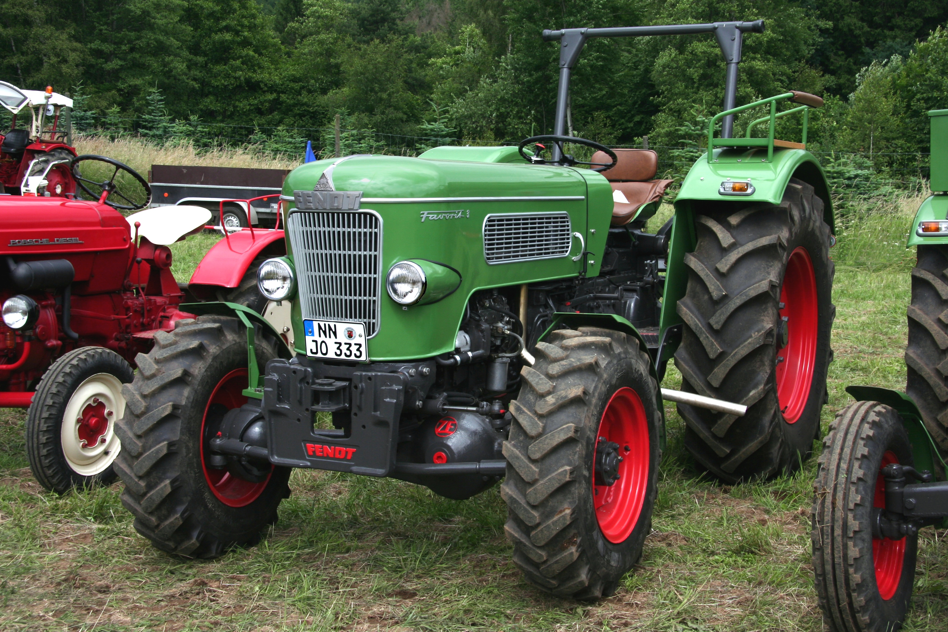 Fendt Favorit 3 mit Allradantrieb, Bauzeit 1964 bis 1967; nur ca. 770 Stück wurden gebaut.